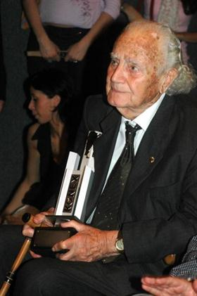 El reconocido folklorólogo argentino, Félix Coluccio, quien fuera director del Fondo Nacional de las Artes (1973/4 y 1984-1991) y subsecretario de Cultura de la Nación (1974/5), recibió un premio Konex de platino.